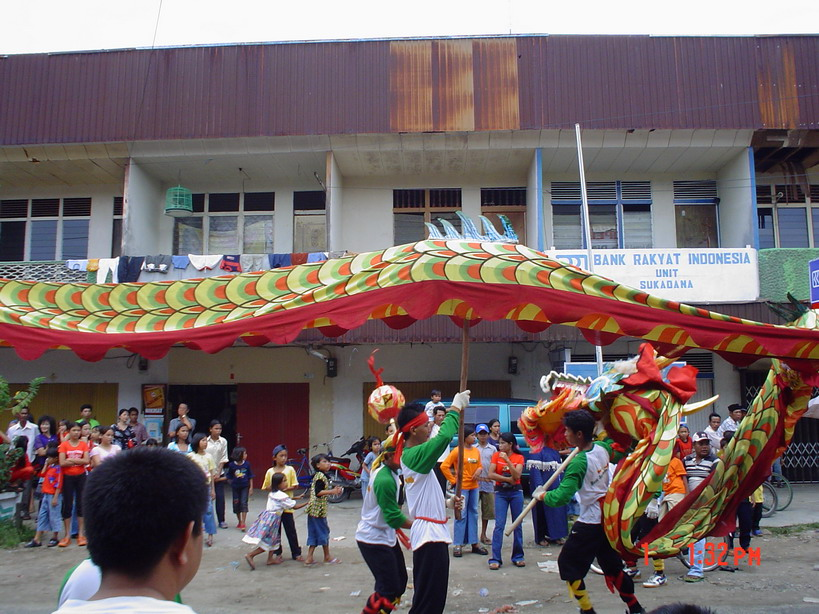 Sukadana, Kabupaten Kayong Utara, Kalimantan Barat, Indonesia. Dragon (Liong) dance.